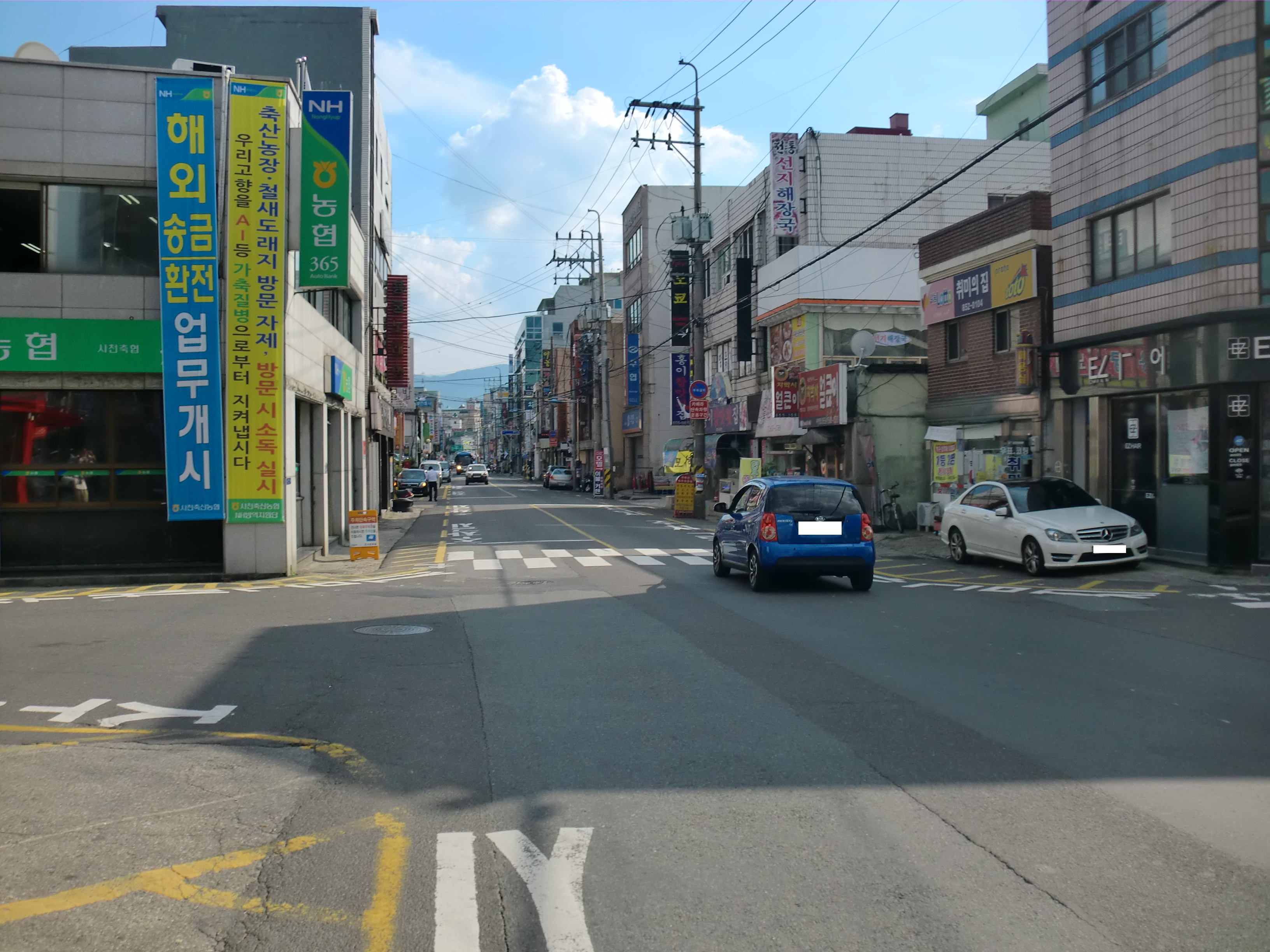 사천읍시가지